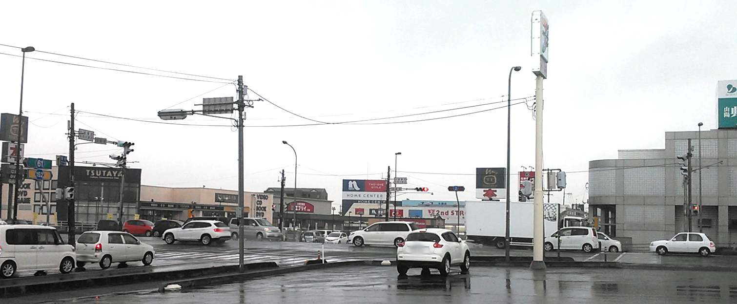 岡山県南区古新田交差点。国道2号岡山バイパス上、岡山県道61号妹尾御津線・152号倉敷妹尾線、起点。